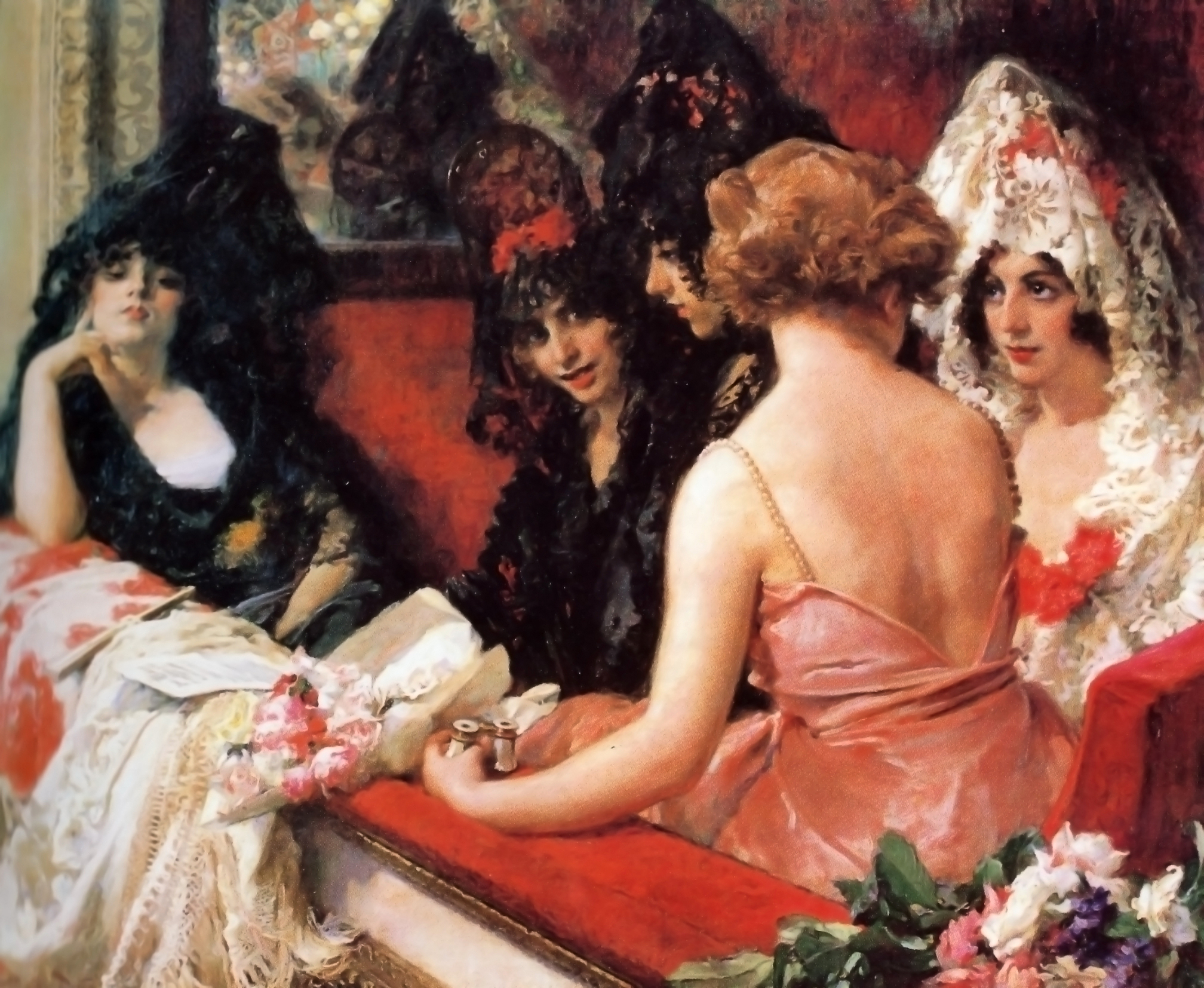 Francisco Pradilla, Damas en el palco o Las Manolas, óleo sobre lienzo. 85 x 104 cms. Cinco "manolas" en un palco del teatro, cuatro de ellas con matilla y peineta; y sobre el barandal del palco, los mantones de Manila.